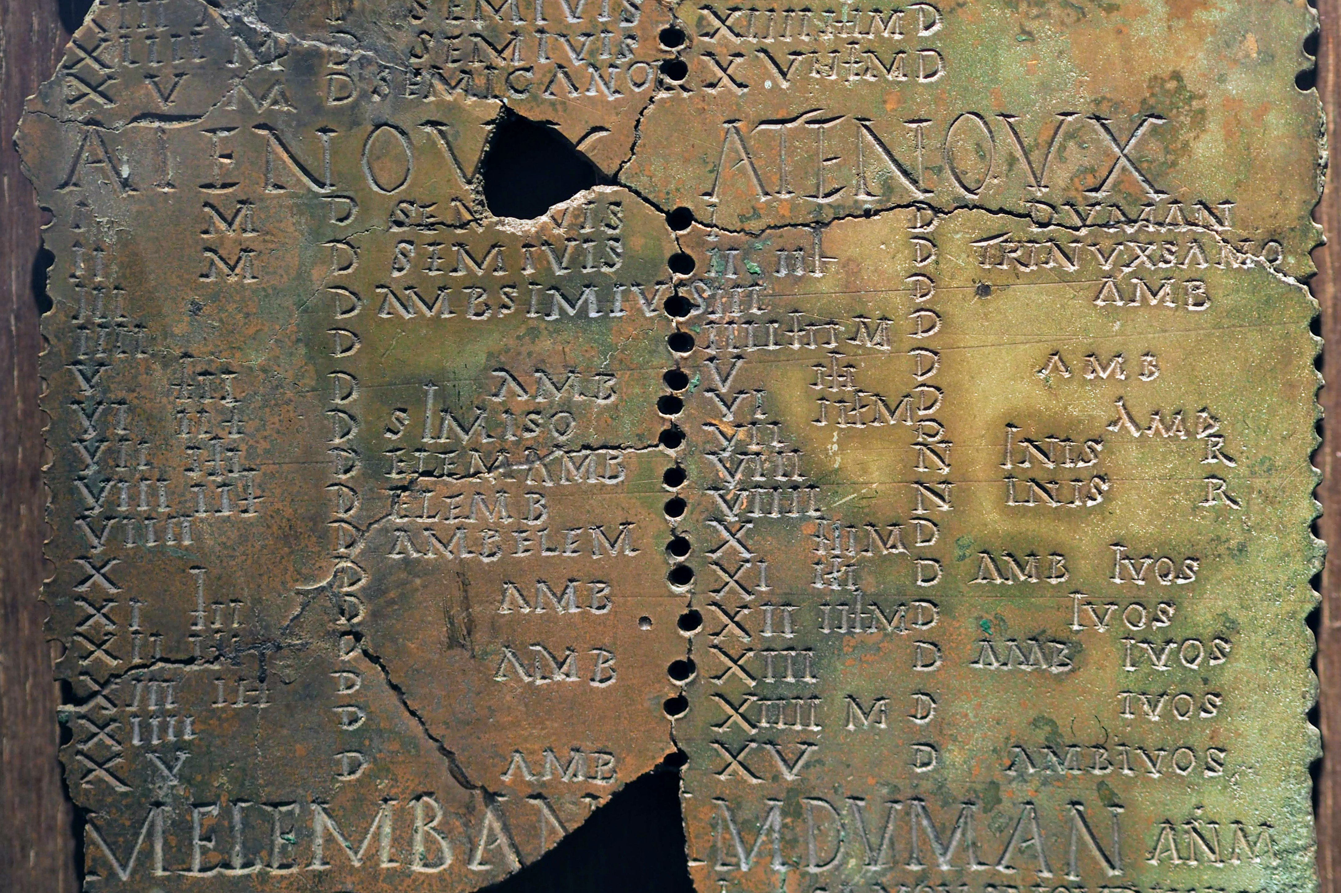 Détail du calendrier de Coligny, Musée Lugdunum à Lyon